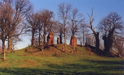 Ruïne Gebroken Slot